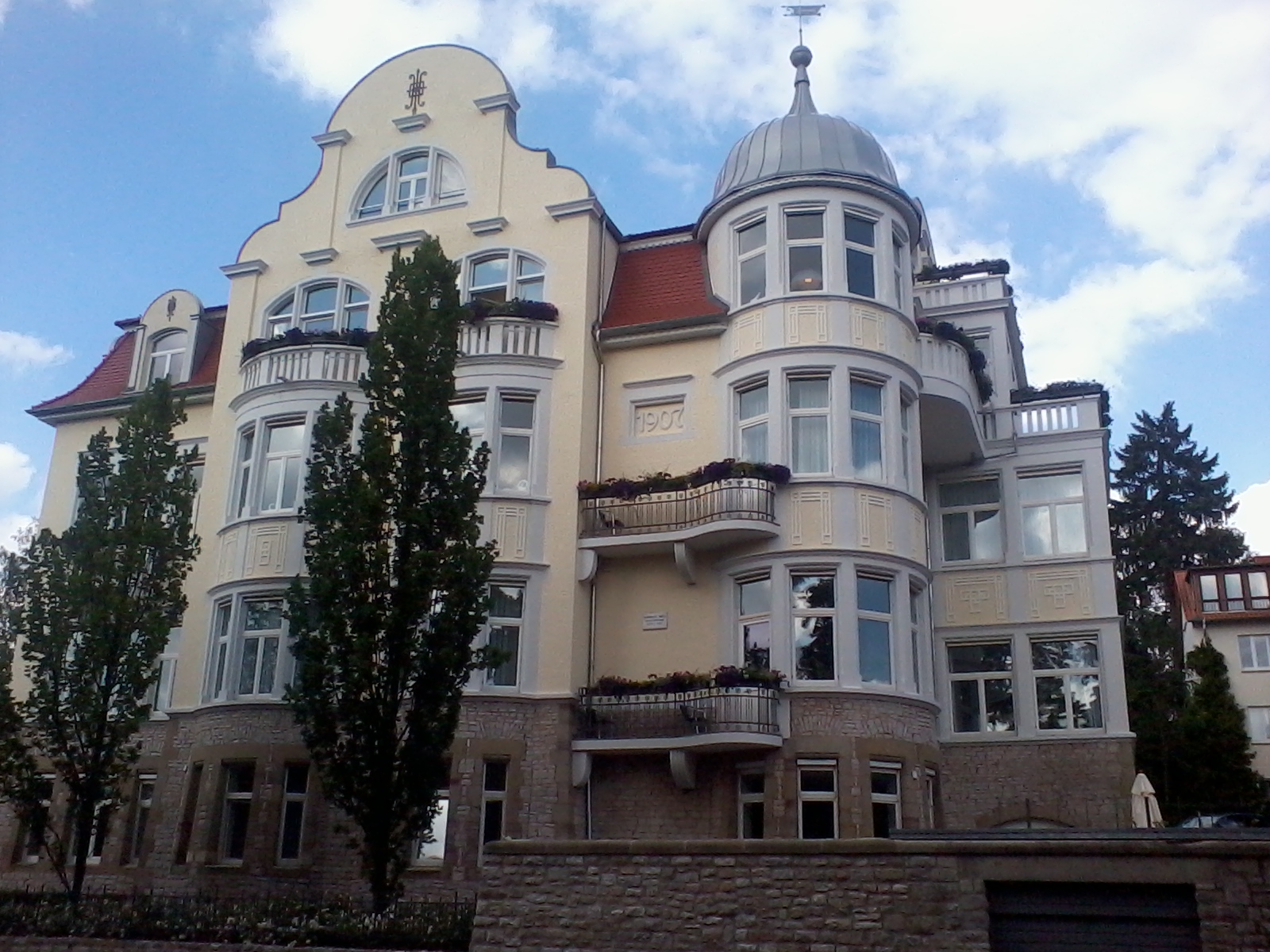 Villa Merkelstraße 3 in Göttingen, inschriftlich datiert 1907. Aufgenommen am 3. Juli 2012